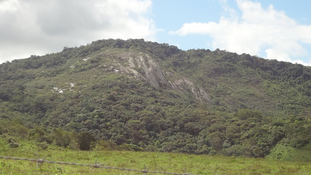 Reserva Biológica de Pedra Talhada, Alagoas.